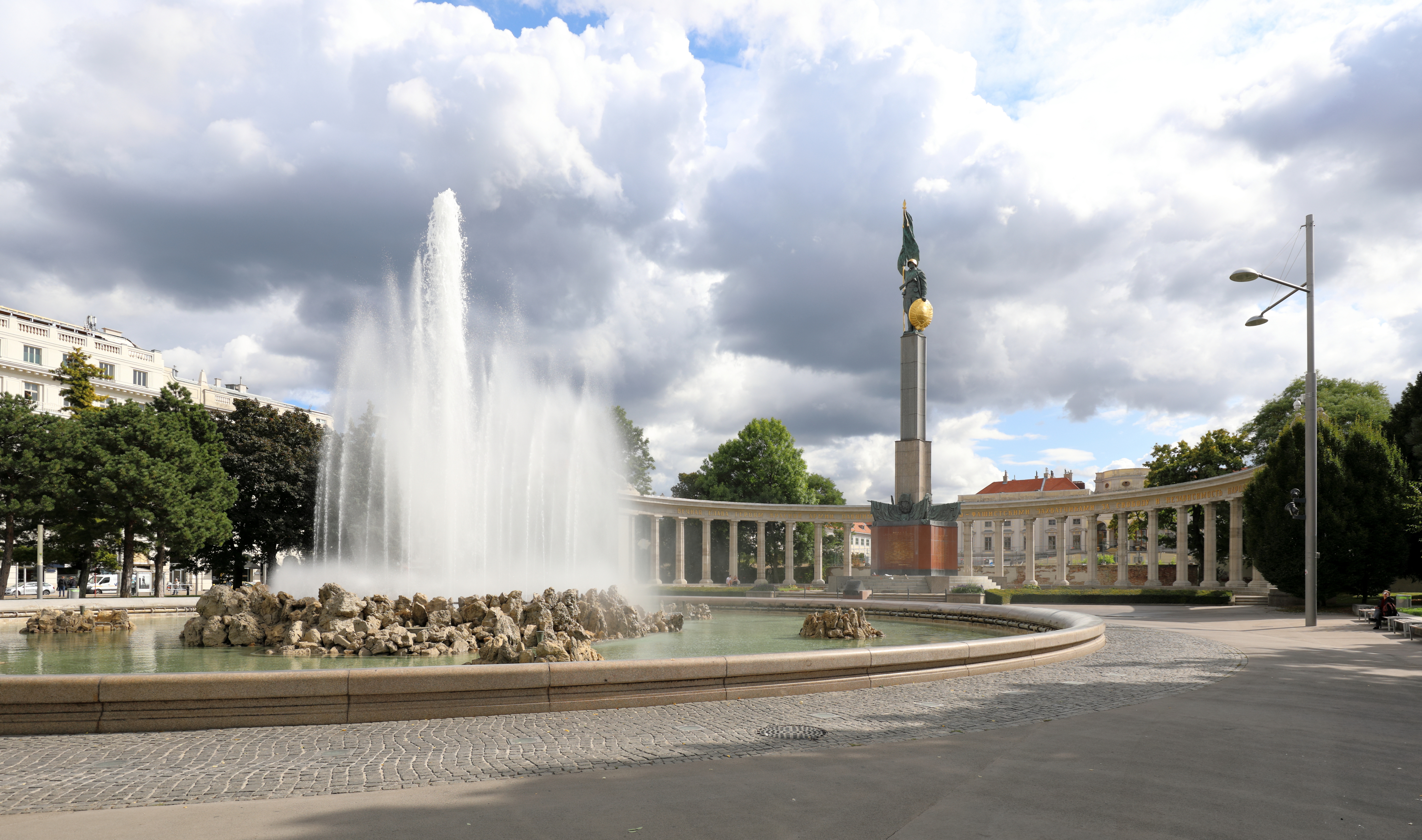 Nordwestansicht des Hochstrahlbrunnens und des Denkmals zu Ehren der Soldaten der Sowjetarmee (auch Heldendenkmal der Roten Armee bzw. umgangssprachlich Russendenkmal bezeichnet) am Schwarzenbergplatz im 3. Wiener Gemeindebezirk Landstraße.Der Brunnen wurde am 24. Oktober 1873 anlässlich der feierlichen Vollendung der ersten Hochquellenleitung in Anwesenheit Franz Josephs I. Gabrielli in Betrieb gesetzt. Gestiftet wurde er von Anton Gabrielli, der als Bauunternehmer der Hochquellenleitung 200.000 Kronen zugunsten der Errichtung dieses Brunnens spendete.Das Russendenkmal erinnert an 18.000 Soldaten der Roten Armee, die bei der Eroberung Wiens zu Tode gekommen sind und wurde am 19. August 1945 feierlich enthüllt. Es besteht aus einer acht Meter hohen Balustrade mit 26 Säulen, an deren Enden je eine Gruppe von zwei Kämpfenden angebracht wurde. Im Zentrum befindet sich auf einem 20 Meter hohen Sockel eine 12 Meter hohe Statue eines Rotgardisten.